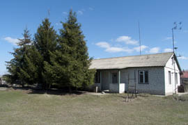 НЧ обсерватория РИНАН, пос. Мартовая